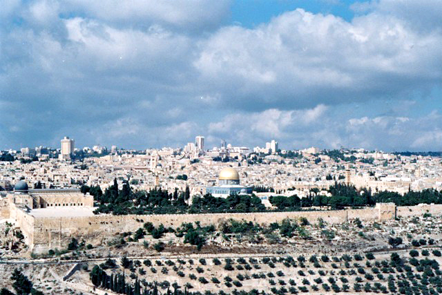 ירושלים מהר הזיתים Jerusalem from the Mount of Olives